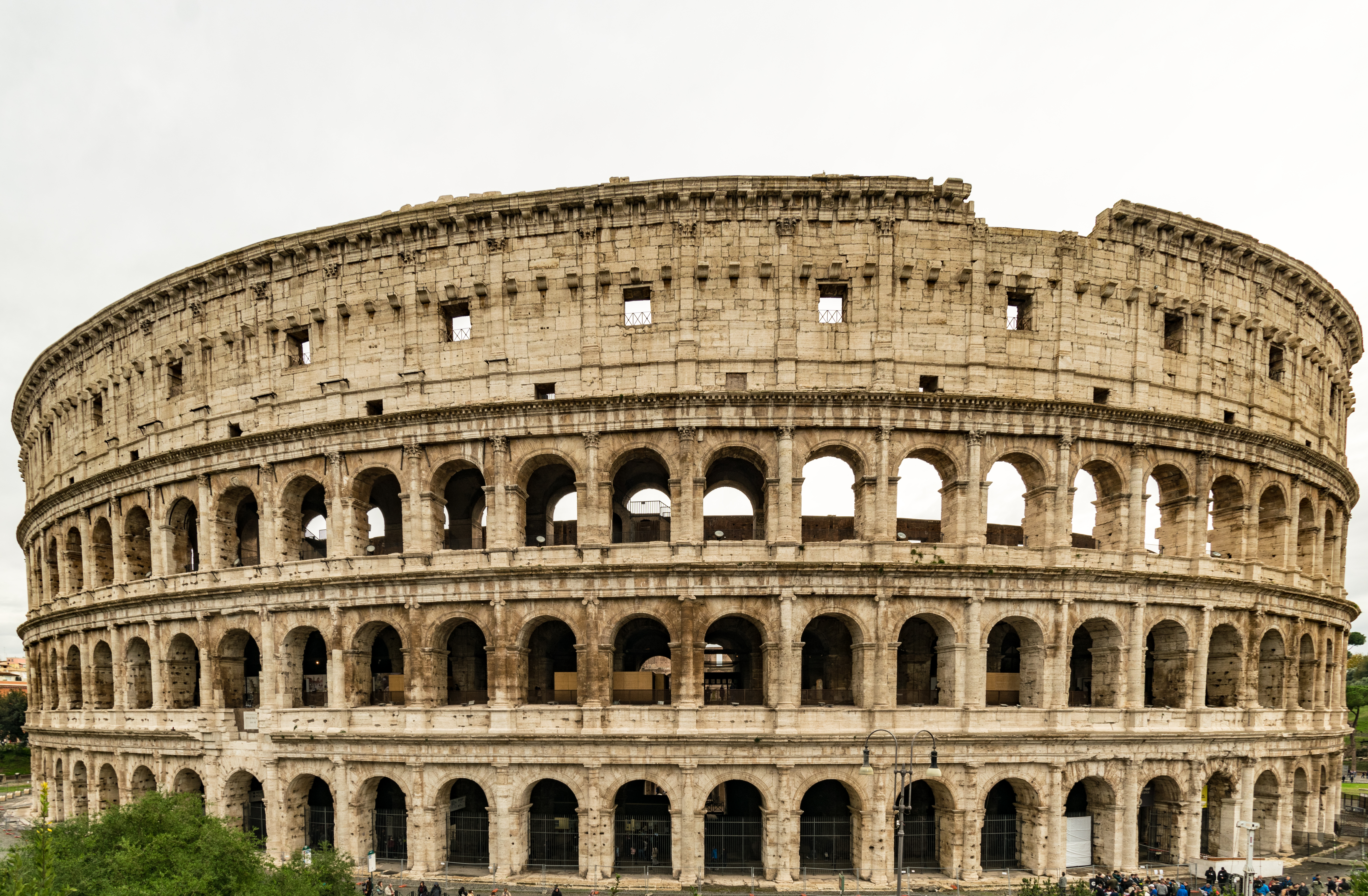 Das Kolosseum in Rom im November 2017 (Nordseite)